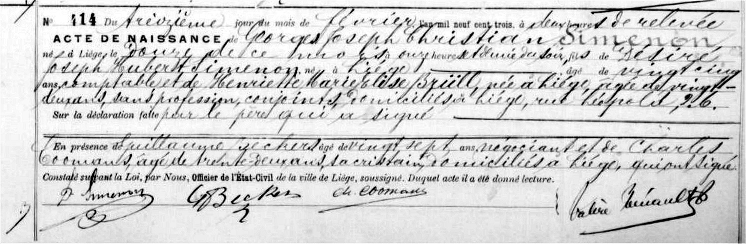 Acte de naissance de Georges Simenon. Etat Civil de Liège 1903. Archives de l'Etat